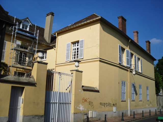 Le château Vilmorin de Verrières-le-Buisson (91)